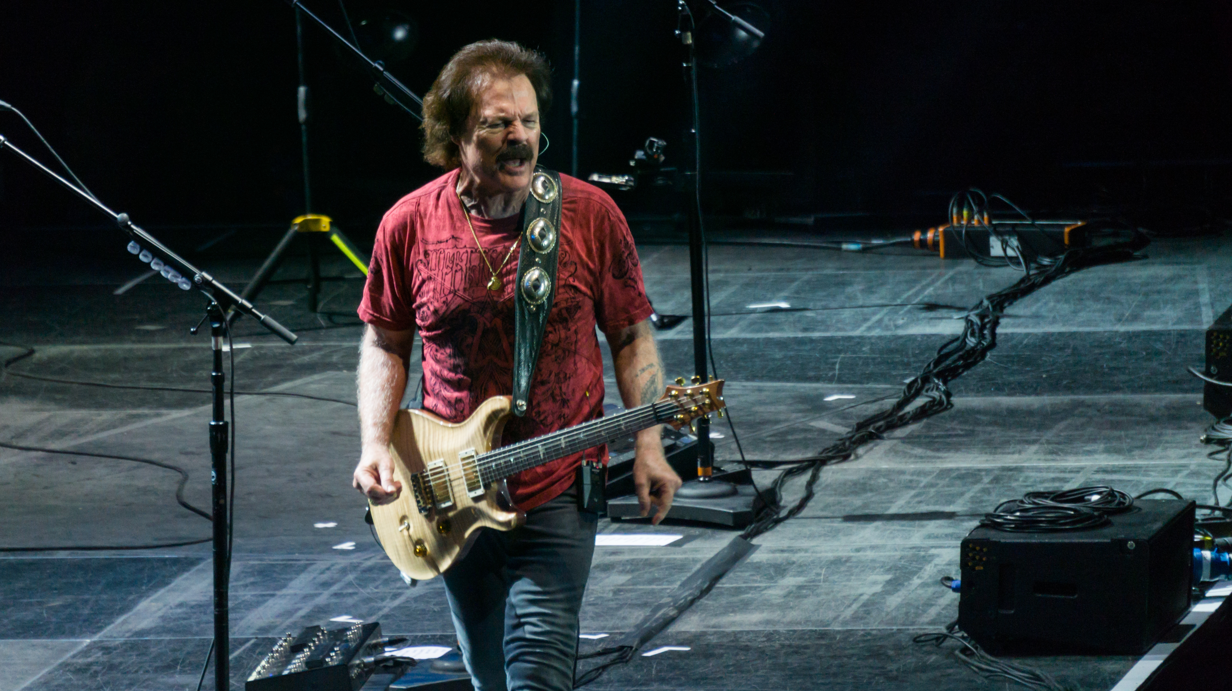 SteelyDanO2291017-10